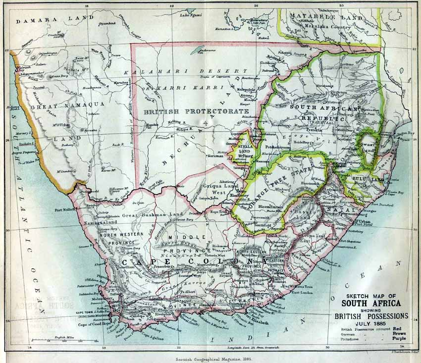 Karte Südafrikas von 1885 Aus der Perry Castaneda Library der Universität Texas.